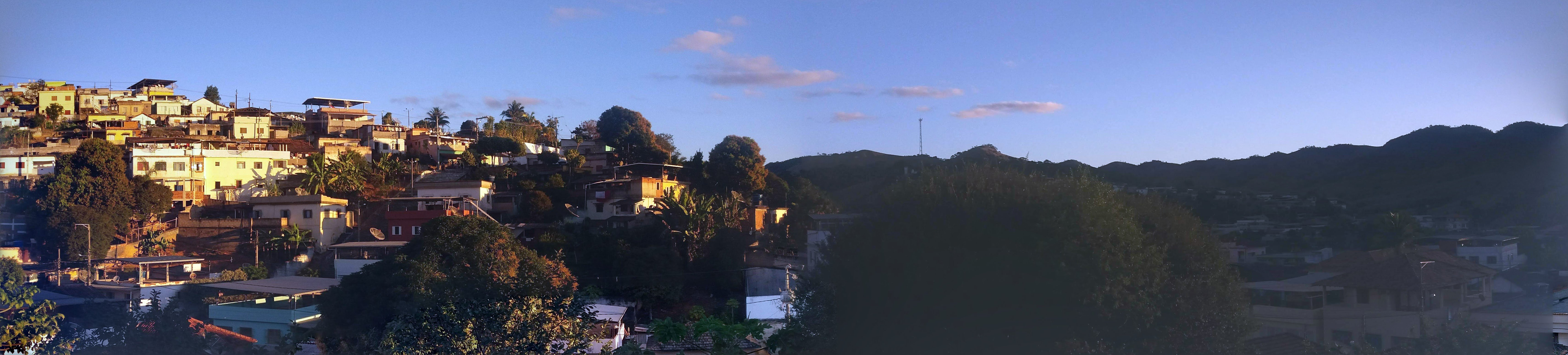 Argirita